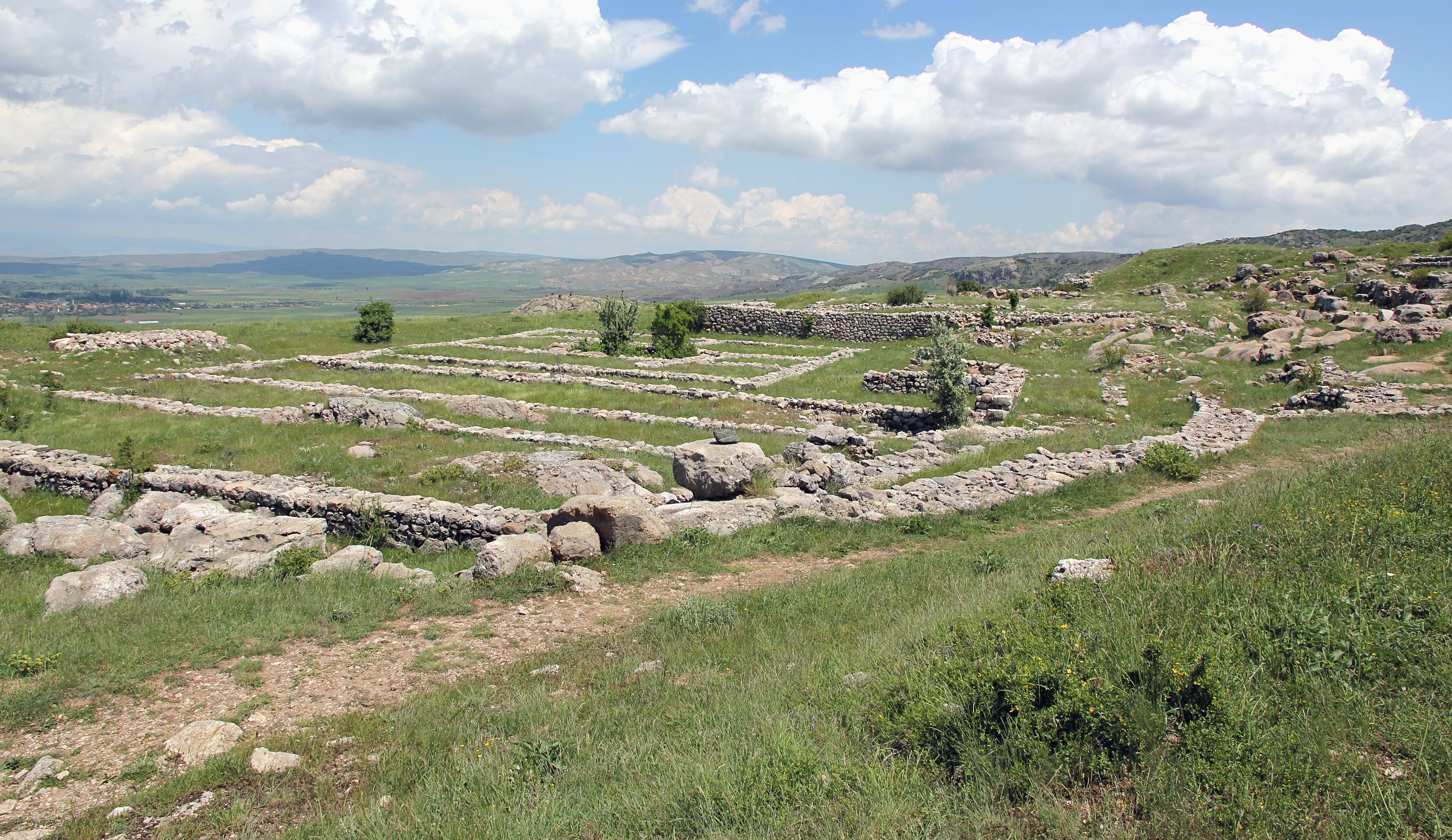 Büyükkale, die Zitadelle der hethitischen Hauptstadt Hattuša bei Boğazkale, Zentraltürkei, Gebäude H, C und B